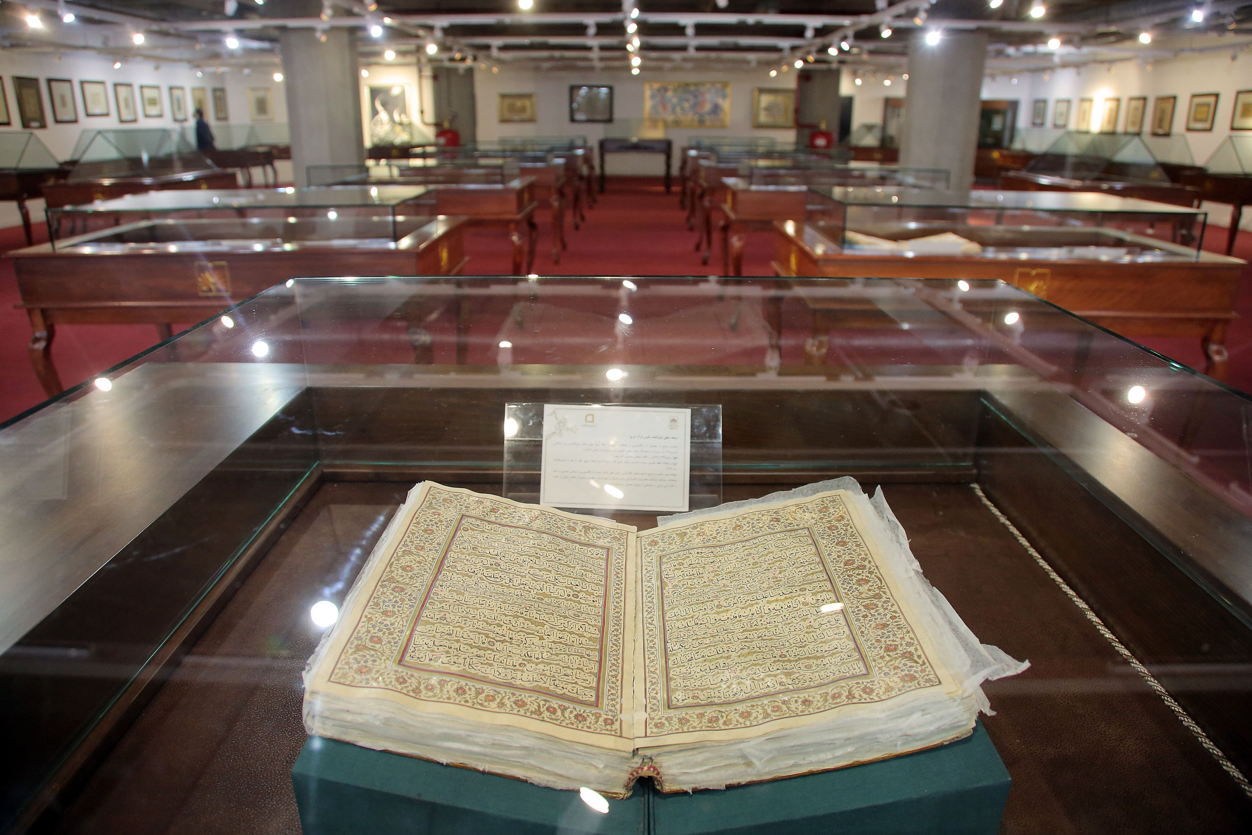 قرآن زین‌العابدین قزوینی در موزه کتاب و میراث مستند ایران (سوره طه، آیهٔ ۲۲ تا ۵۹)